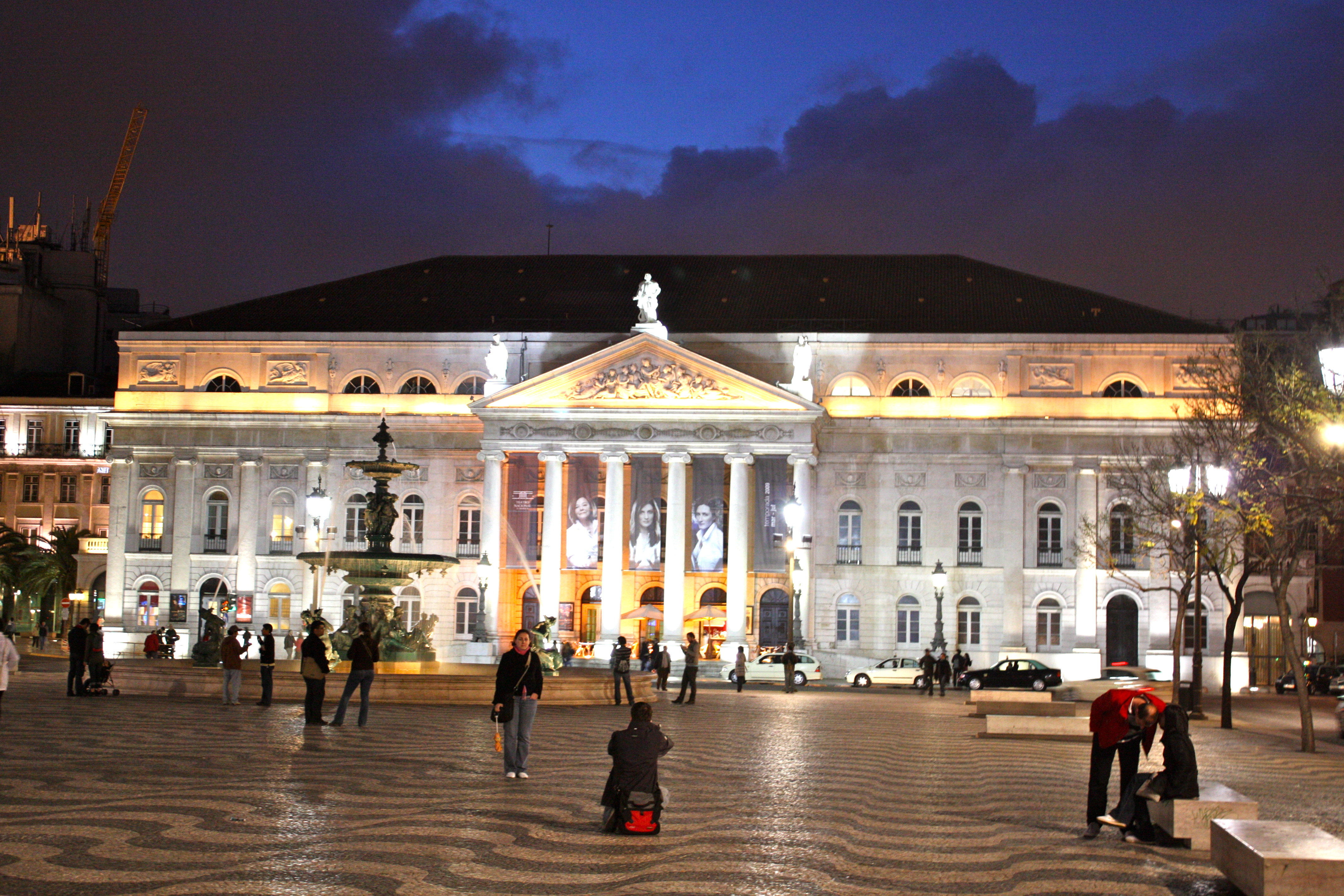 Lisbon One - 160